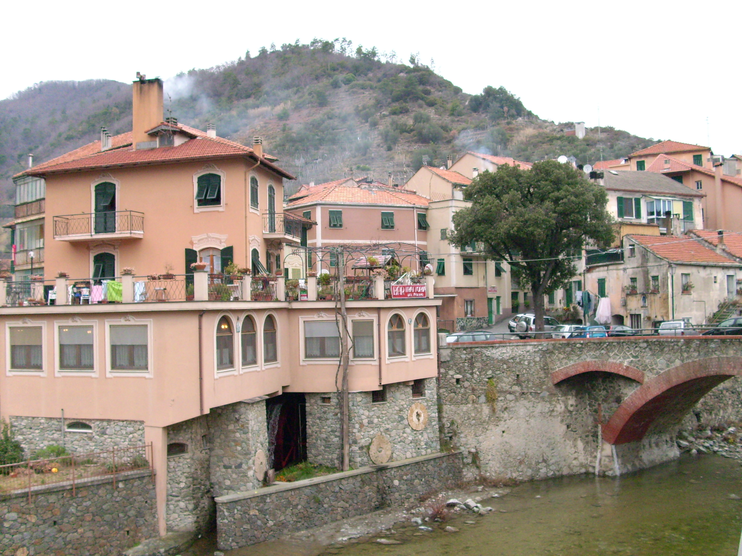 Panorama di Ellera (Albisola Superiore), Liguria, Italy